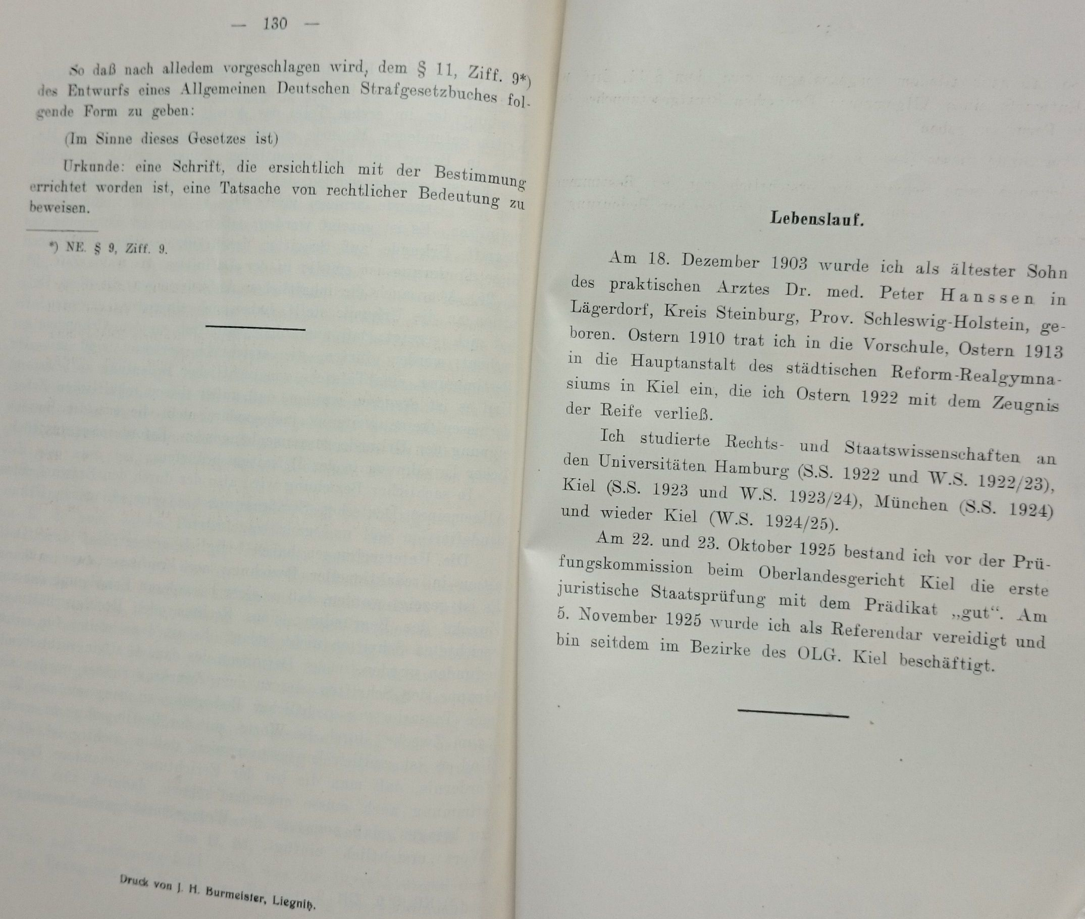 Lebenslauf in: Kurt-Walter Hanssen: Der Begriff Urkunde im amtlichen Entwurf eines allgemeinen deutschen Strafgesetzbuches, Dissertation Breslau 1928